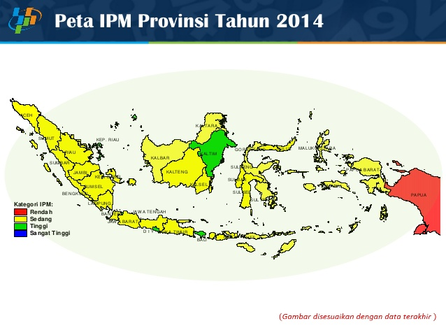 IPM Provinsi Indonesia pada tahun 2014